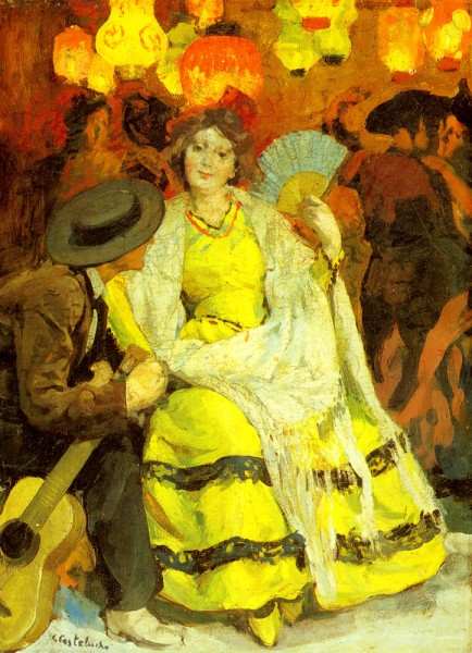 En ecoutant la musique